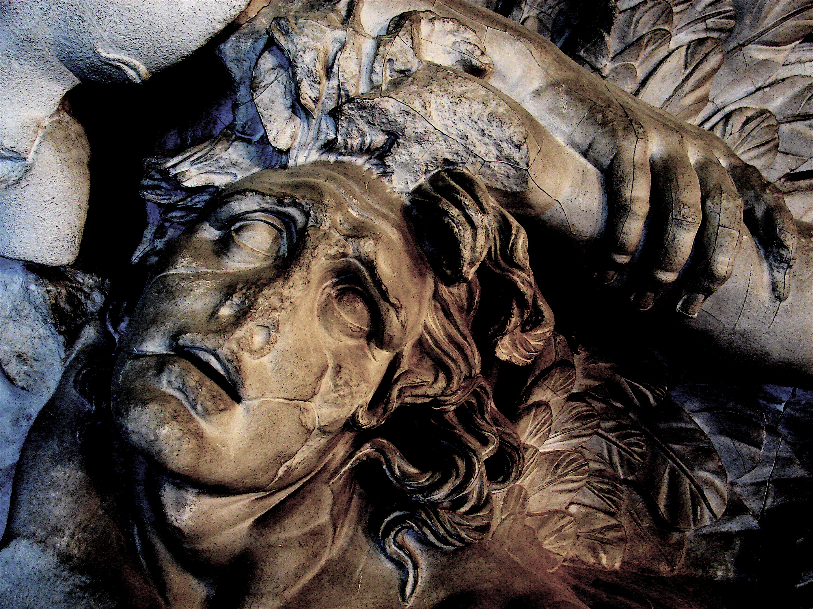 Detalje fra Den Kongelige Afstøbningssamling, København